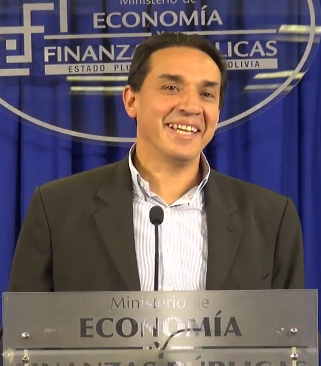 Mario Guillen en agosto de 2017